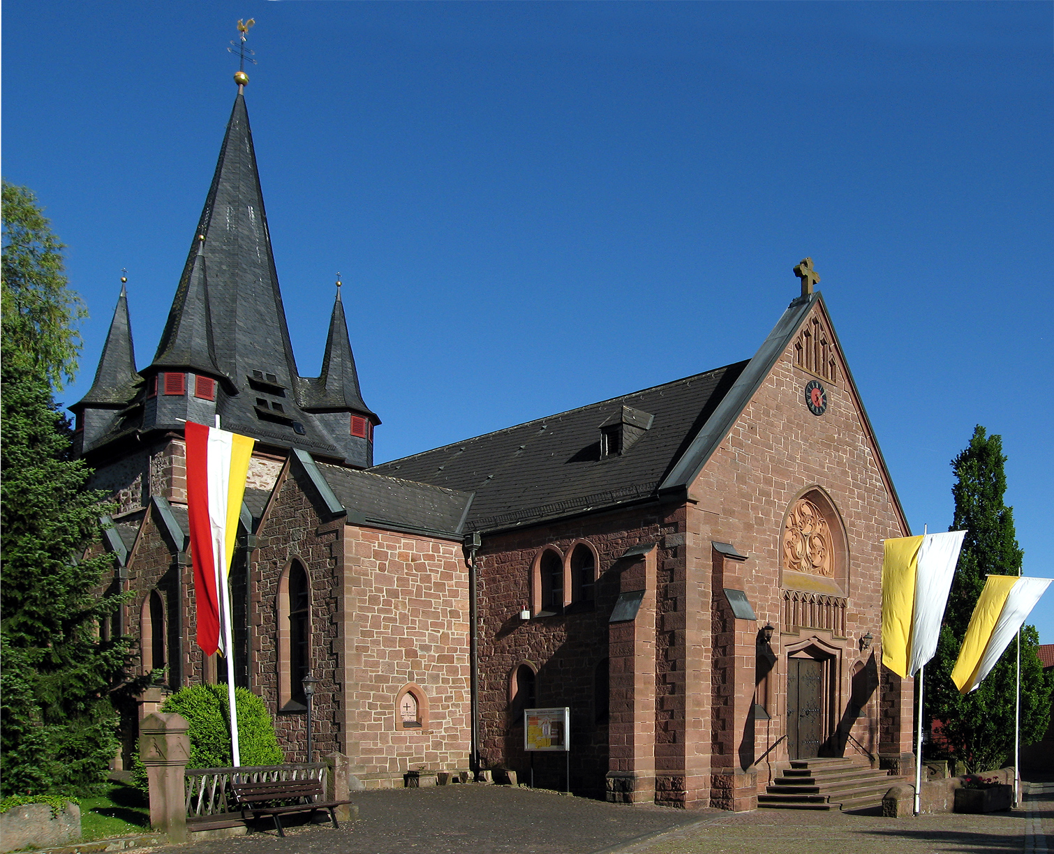 Church of Bauerbach